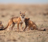 Raposa-de-Bengala